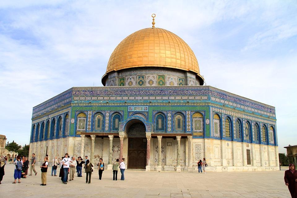 जेरुसलेम येथील मंदिराच्या जागेवर उभारलेली मशिद